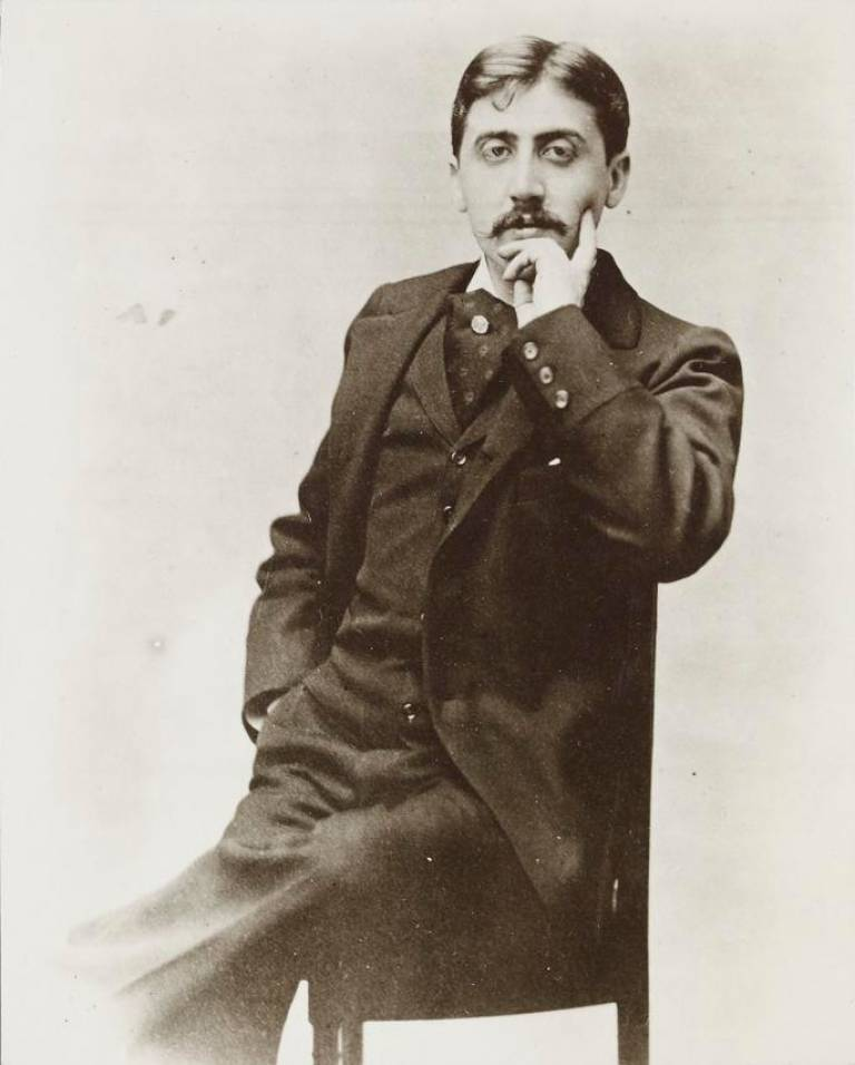 Photo de Marcel Proust par Otto Wegener (1849-1924). Sur carton du photographe, dimensions 14,2 x 10,2 cm. De la série de plusieurs poses en 1895, le bas du carton n'est pas reproduit. Collection privée